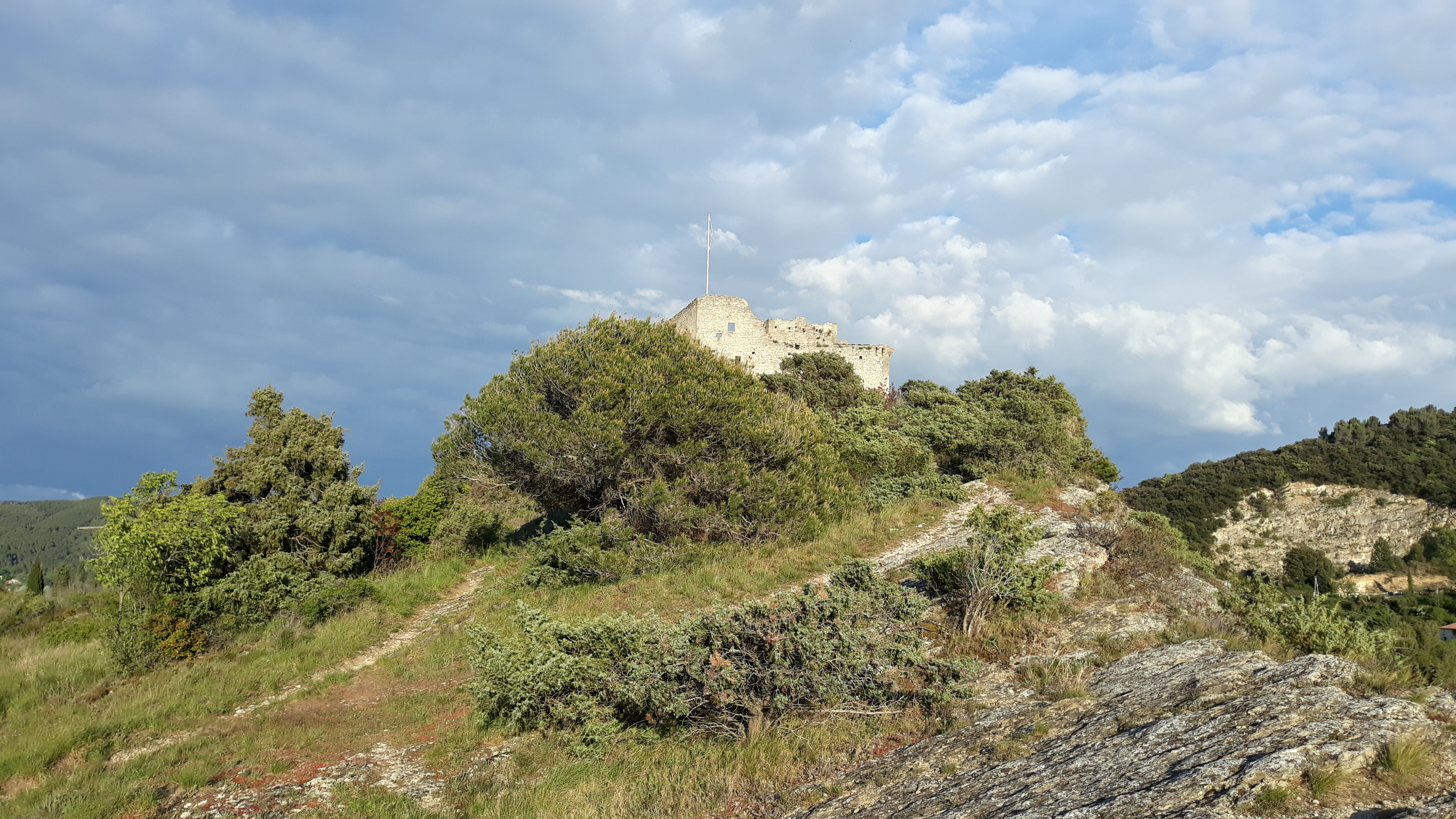 Château de Vaison-La-Romaine